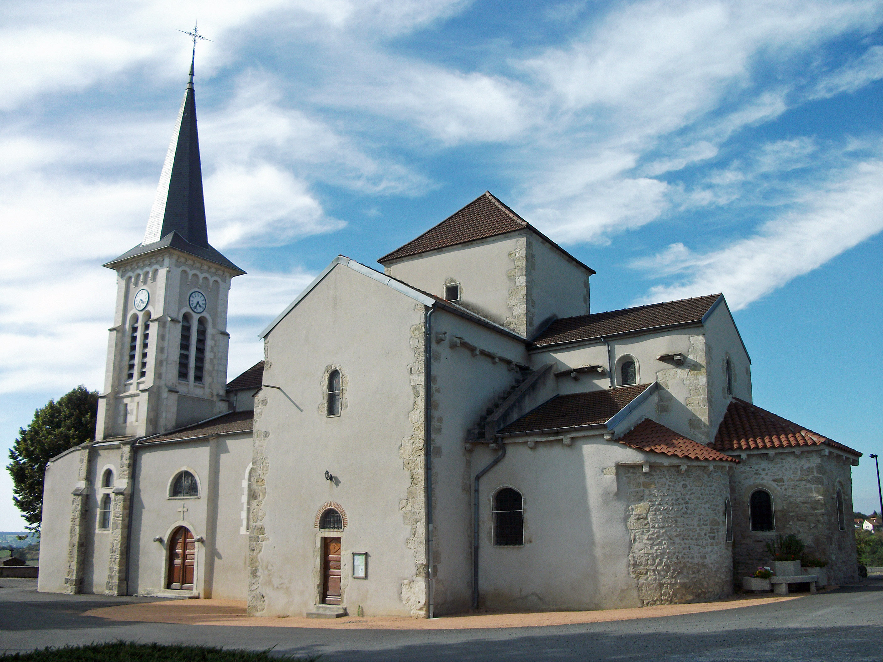 Église de Creuzier-le-Vieux